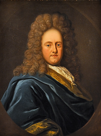 Bildnis des Johann Hartmann Senckenberg (1655-1730), Vater von Johann Christian Senckenberg und Heinrich Christian von Senckenberg